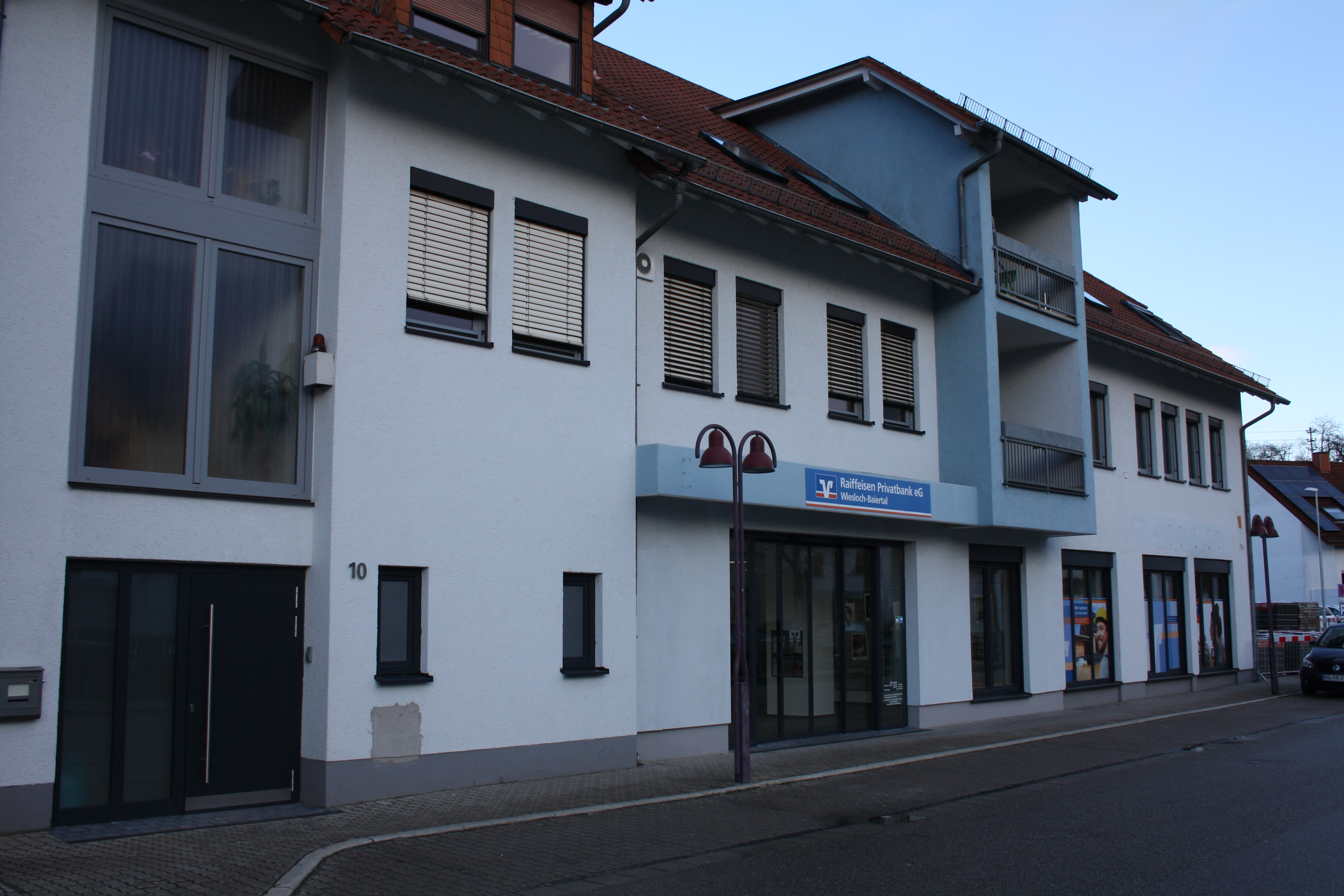 Raiffeisen Privatbank eG - Bankgebäude Baiertal im Januar 2018